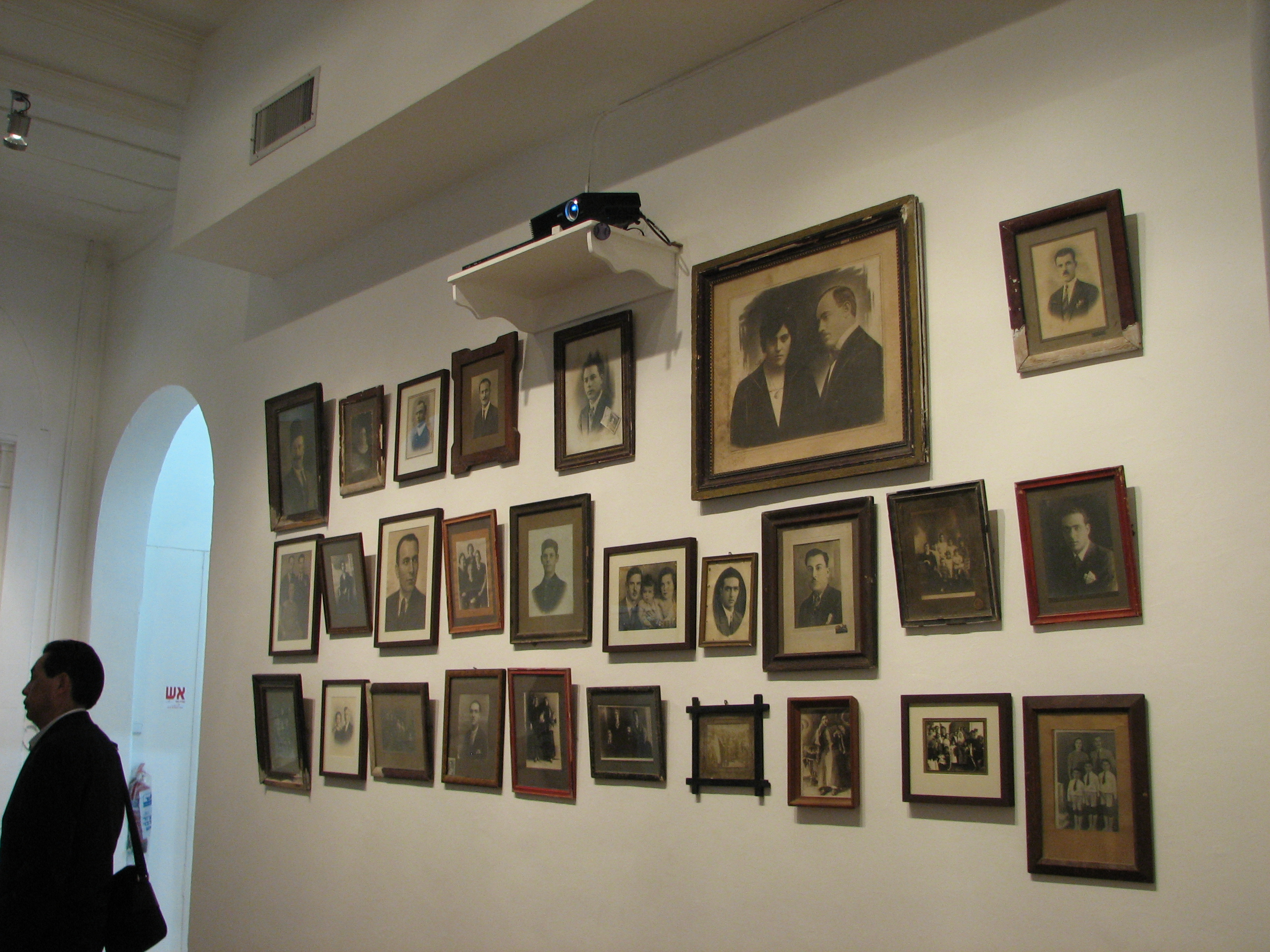 Beth Hagefen' Haifa Israel בית הגפן הוא מרכז ערבי יהודי לתרבות חברה נוער וספורט השוכן בואדי ניסנס בחיפה תערוכה שכנים בבית הגפן, חלק מפסטיבל החג של החגים 2010, קיר זכרון של תושבי ואדי ניסנאס